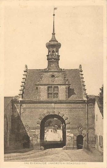 Nieistniejąca (druga), nowożytna Brama św. Jakuba w Gdańsku, widok od strony miasta.